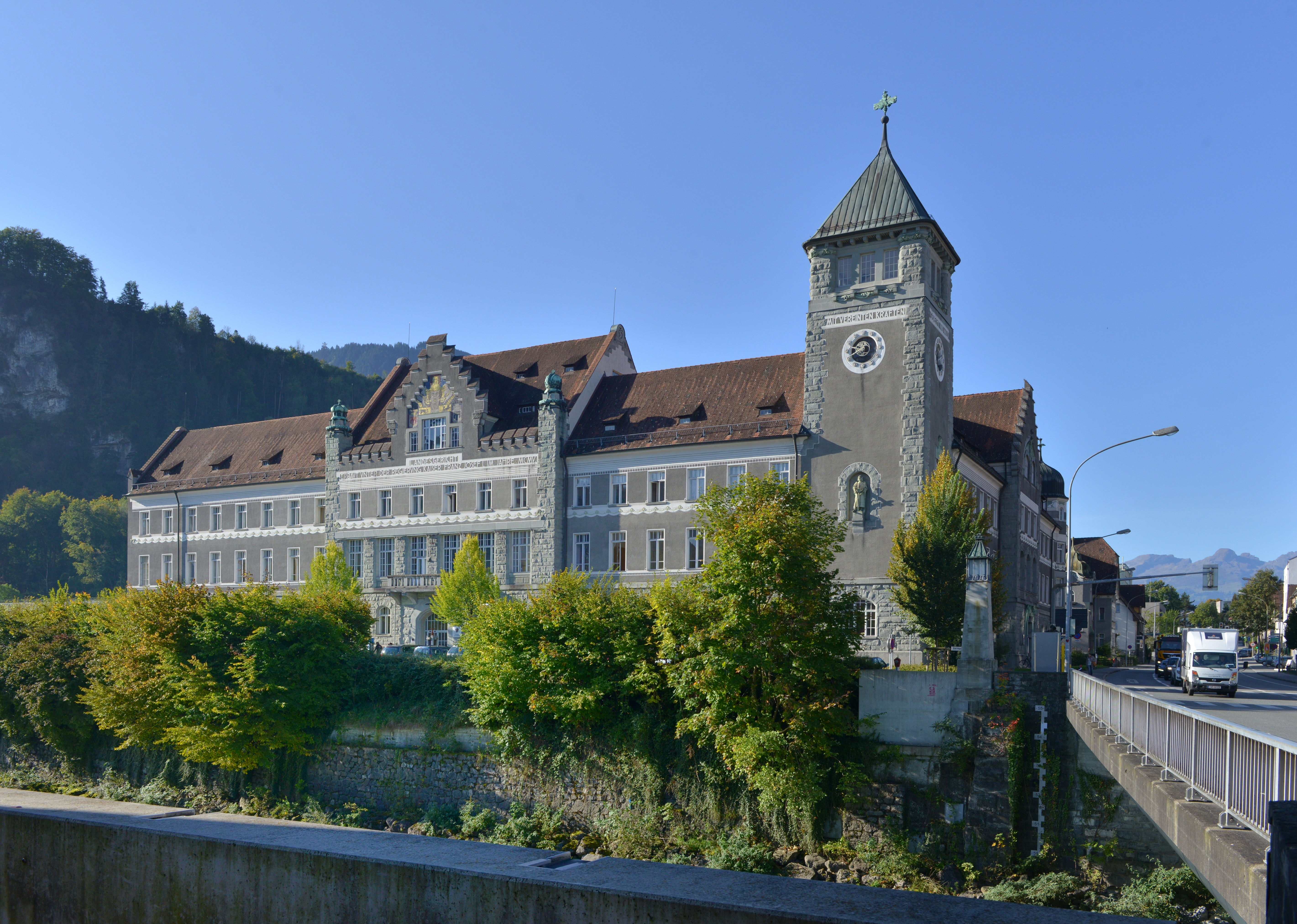 Landesgericht Feldkirch an der Schillerstrasse 1 in Feldkirch im österreichischen Bundesland Vorarlberg